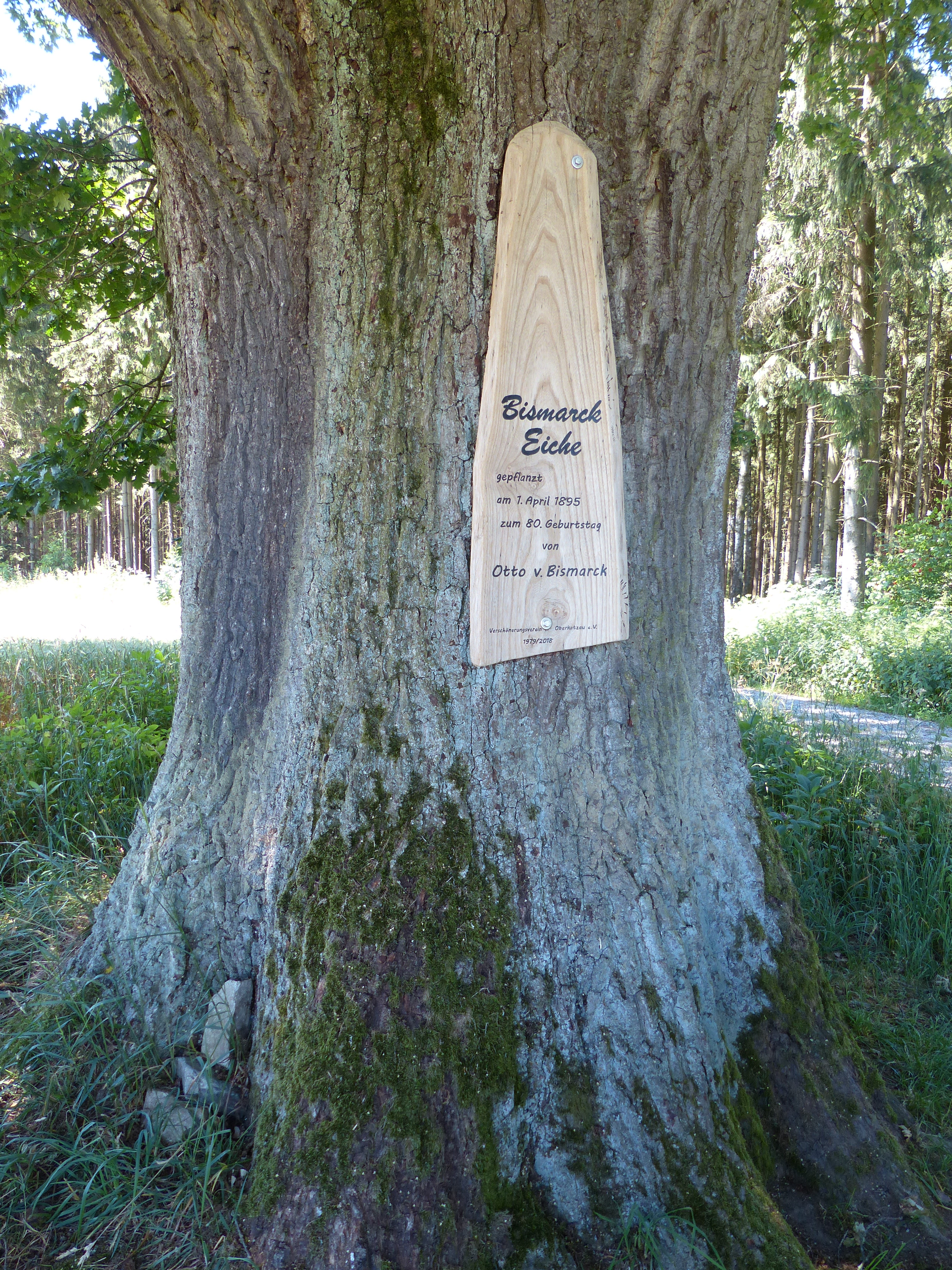 Naturdenkmal Bismarckeiche beim Untreusee